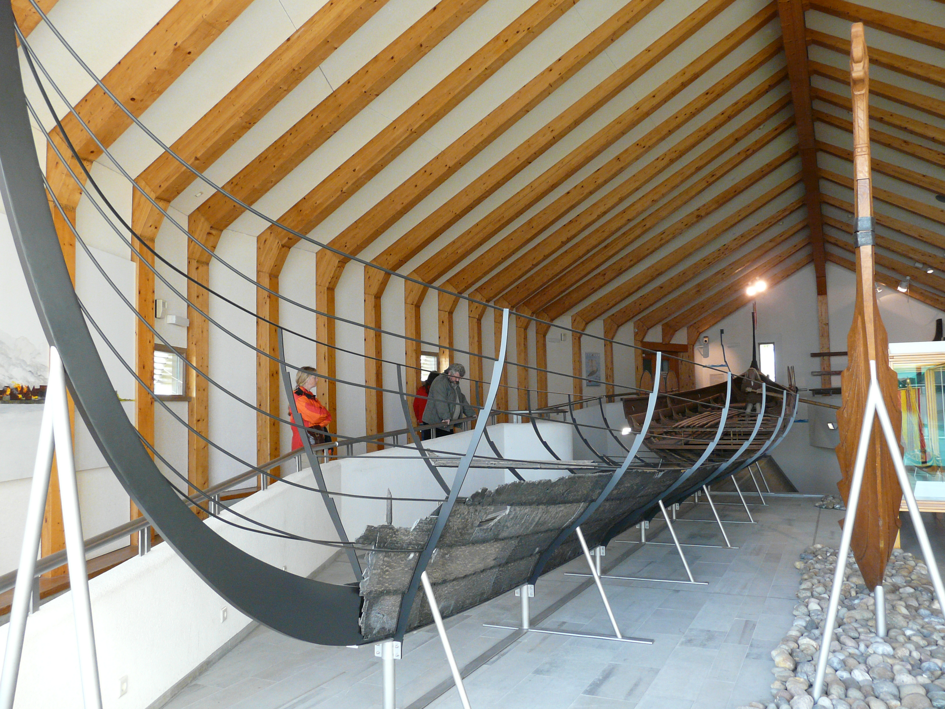 Rekonstruiertes Wikinger-Langschiff im Museum Haithabu